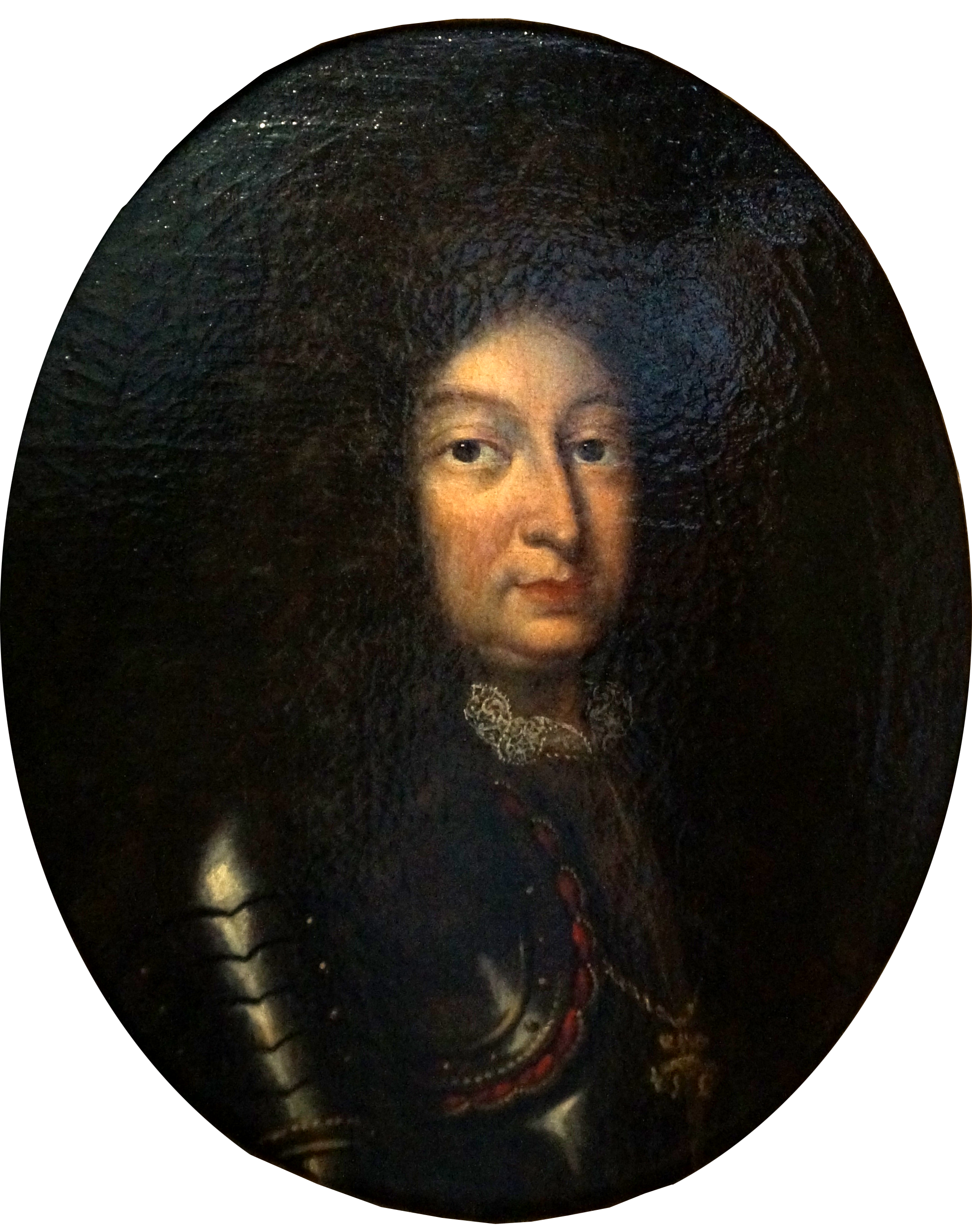 Peinture présenteé au Musée Lorrain.